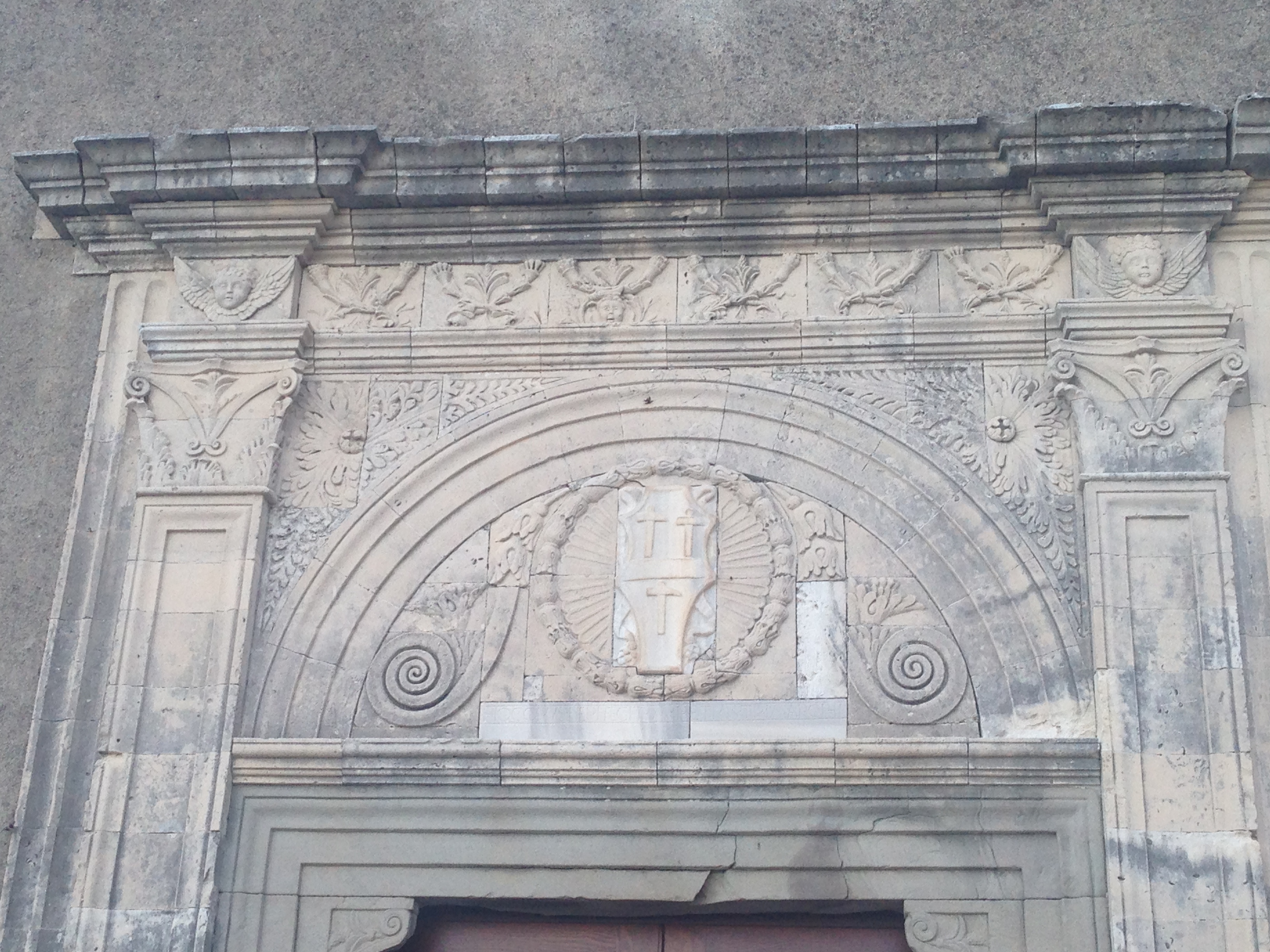 Decori portone